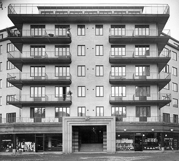 Kv Färjan, fasad, Alströmergatan 32